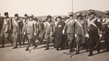 Commemorazione del 4 novembre 1932 ad Iglesias; si riconoscono Sardus Fontana ( terzo in prima fila da sinistra) e suo padre Pietro ( terzo in prima fila da destra )